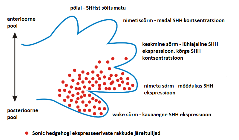 Sonic hedgehogist sõltuv anterio-posterioorne sõrmede kindlaksmääramine.